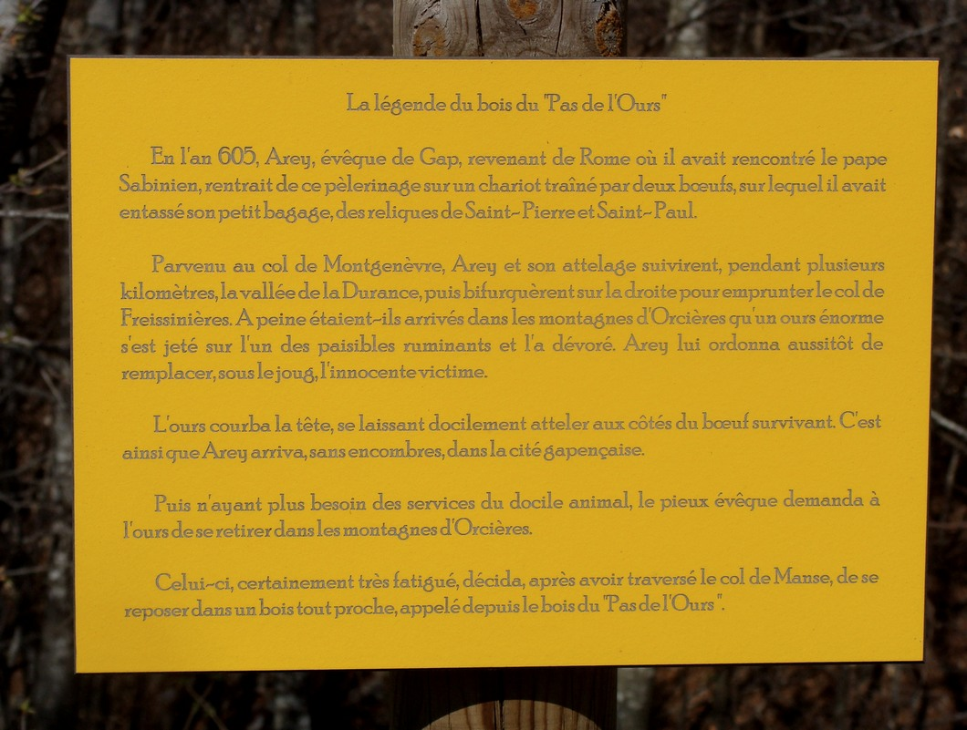 Panneau relatant la légende de l'ours de Saint Arey, sur la route de Manse à Serre-Richard, en Champsaur.